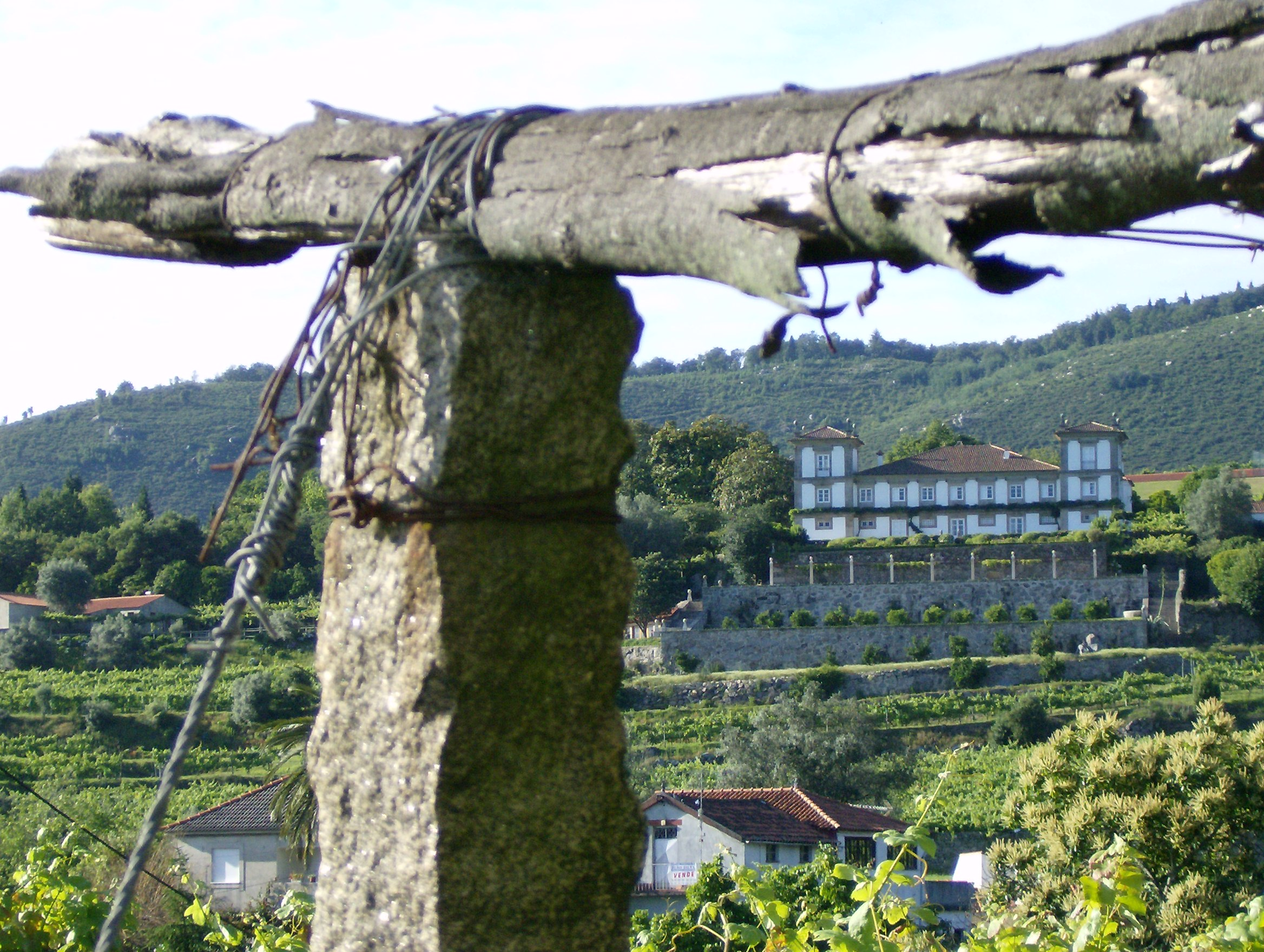 Paço de Calheiros Vila Ponte de Lima Portugal